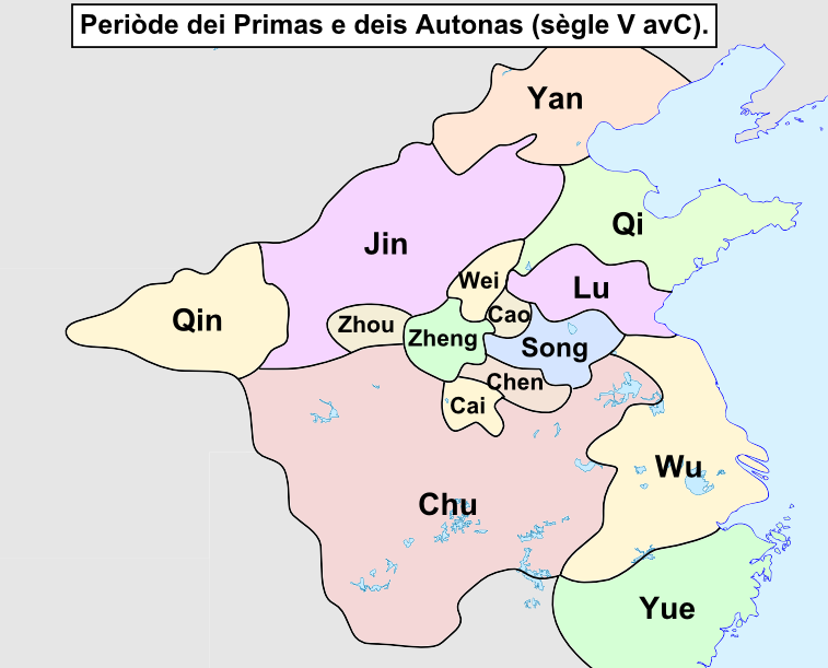 Periòde dei Primas e deis Autonas (sègle V avC).